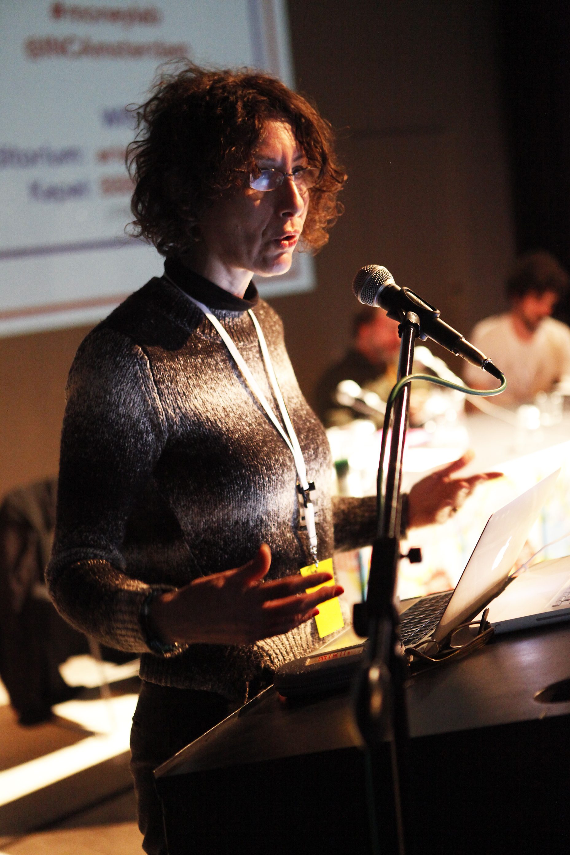 Tiziana Terranova